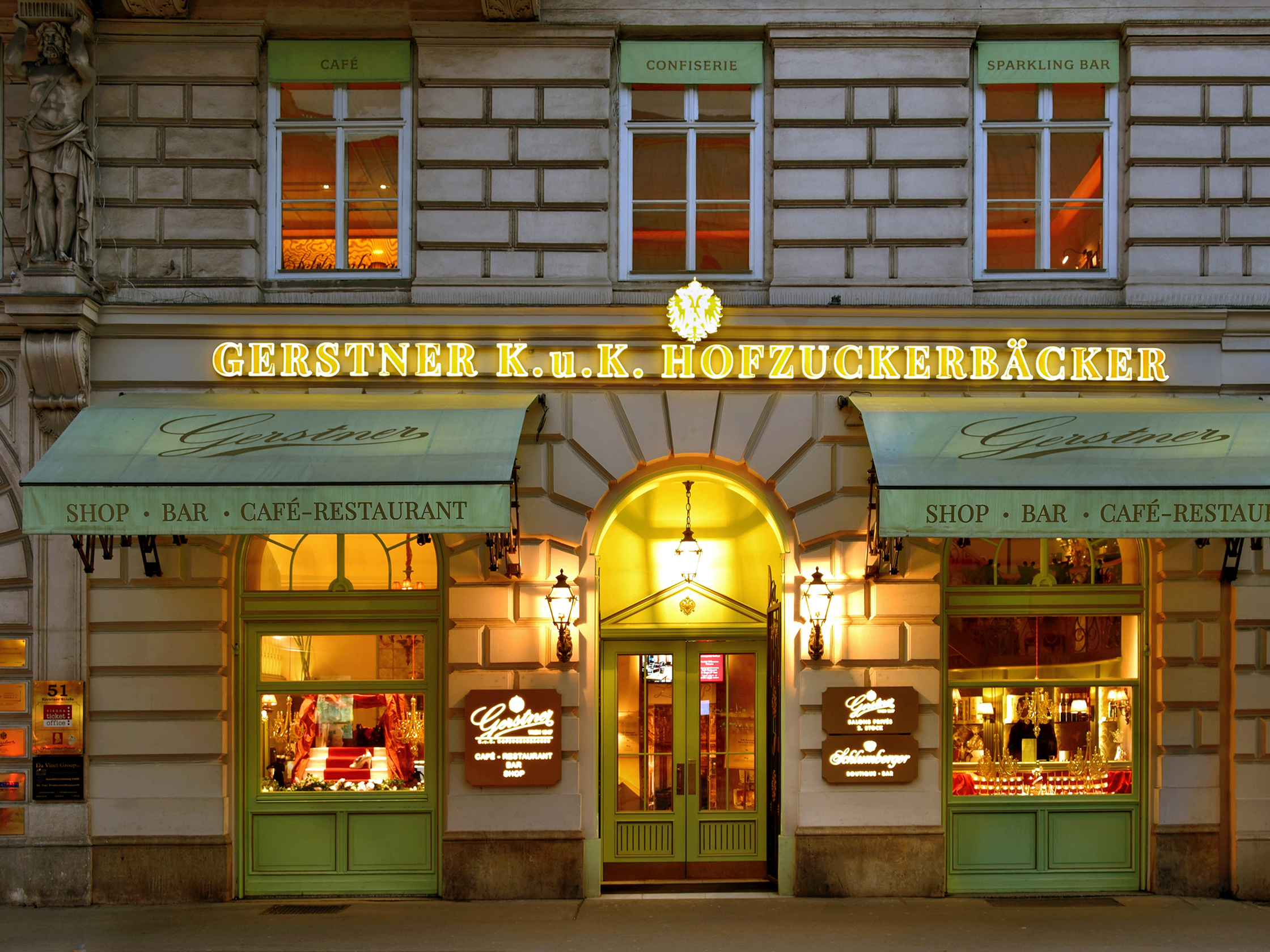 Gerstner K.u.K. Hofzuckerbäcker, Kärntner Straße 51, 1010 Wien